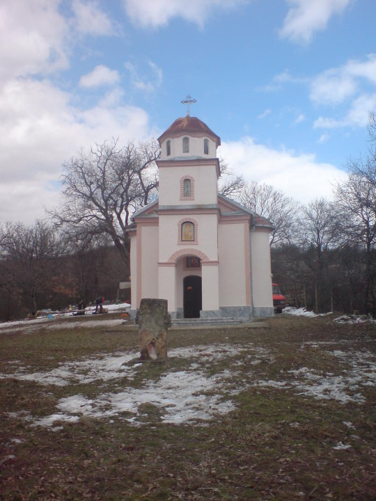 Св. Недела во Теново